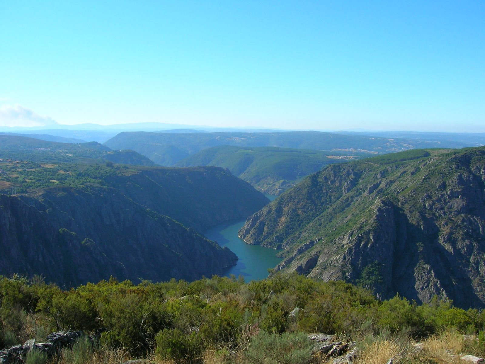 Canóns do Sil, Nogueira de Ramuín á esquerda e Ribas de Sil á dereita